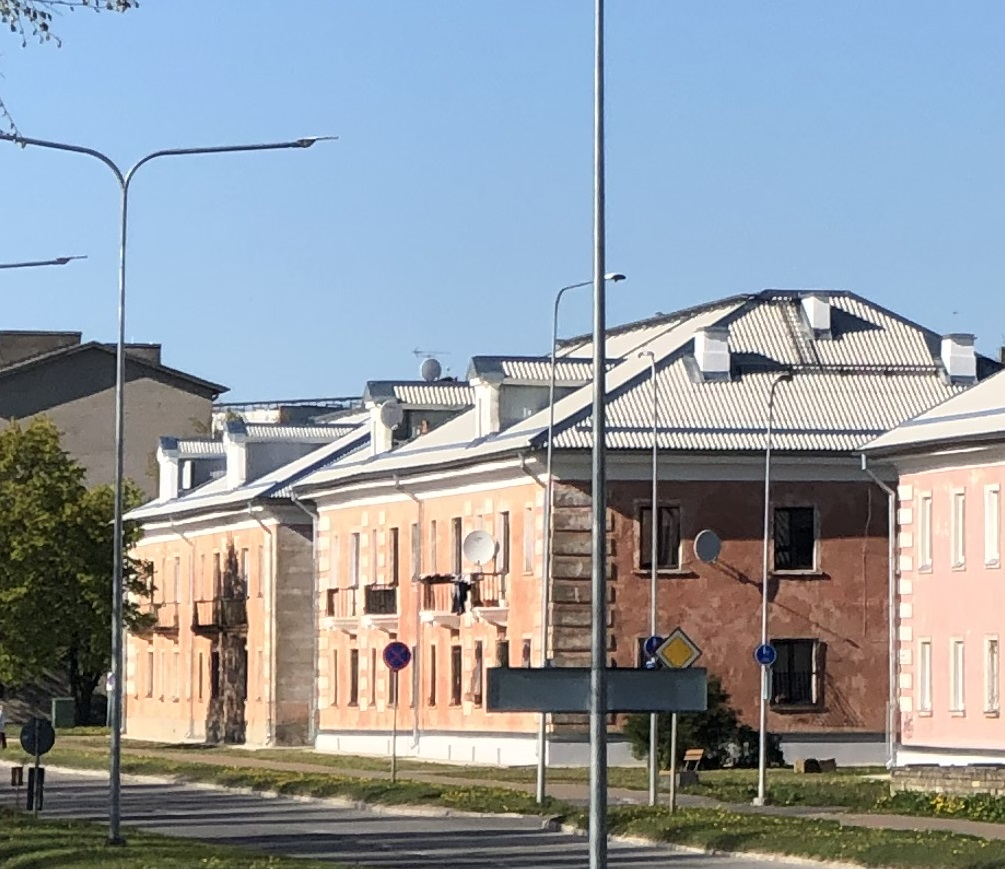 Majad aadressil Koolipõik 2 ja 4 Narvas. Vaade Kreenholmi prospektilt